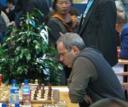 Kasparov na 35. olimpiadi na Bledu 2002.